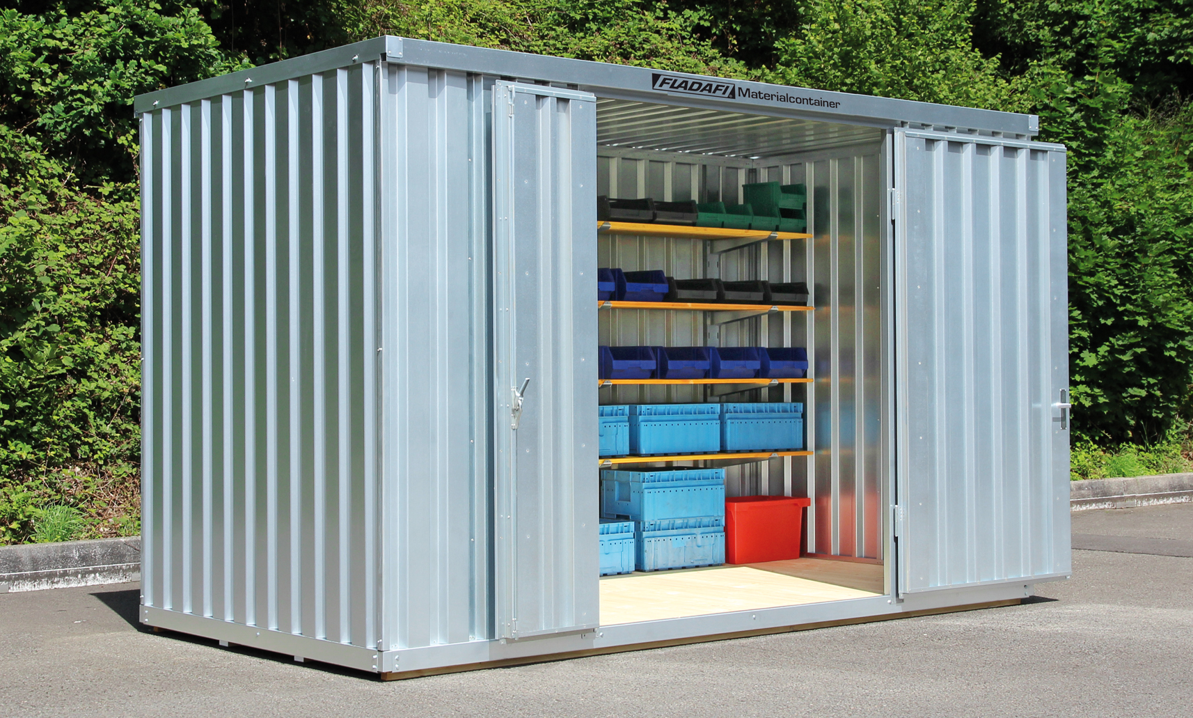 Ein Produkt der Marke FLADAFI® von SÄBU für die Lagerung von Material und Werkzeug.